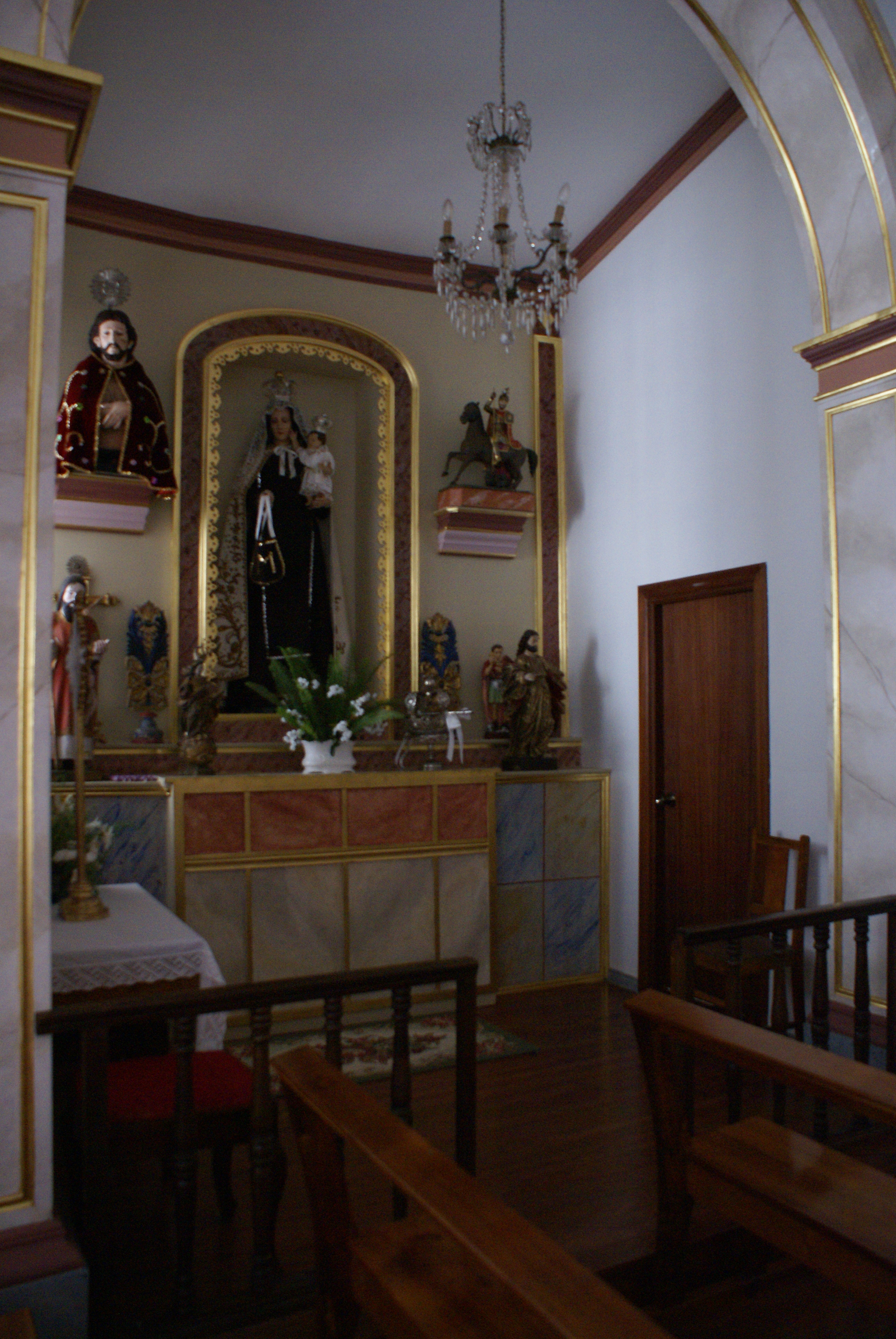 Capela de São Sebastião, Fajã dos Vimes, capela lateral, Calheta, ilha de São Jorge, Açores